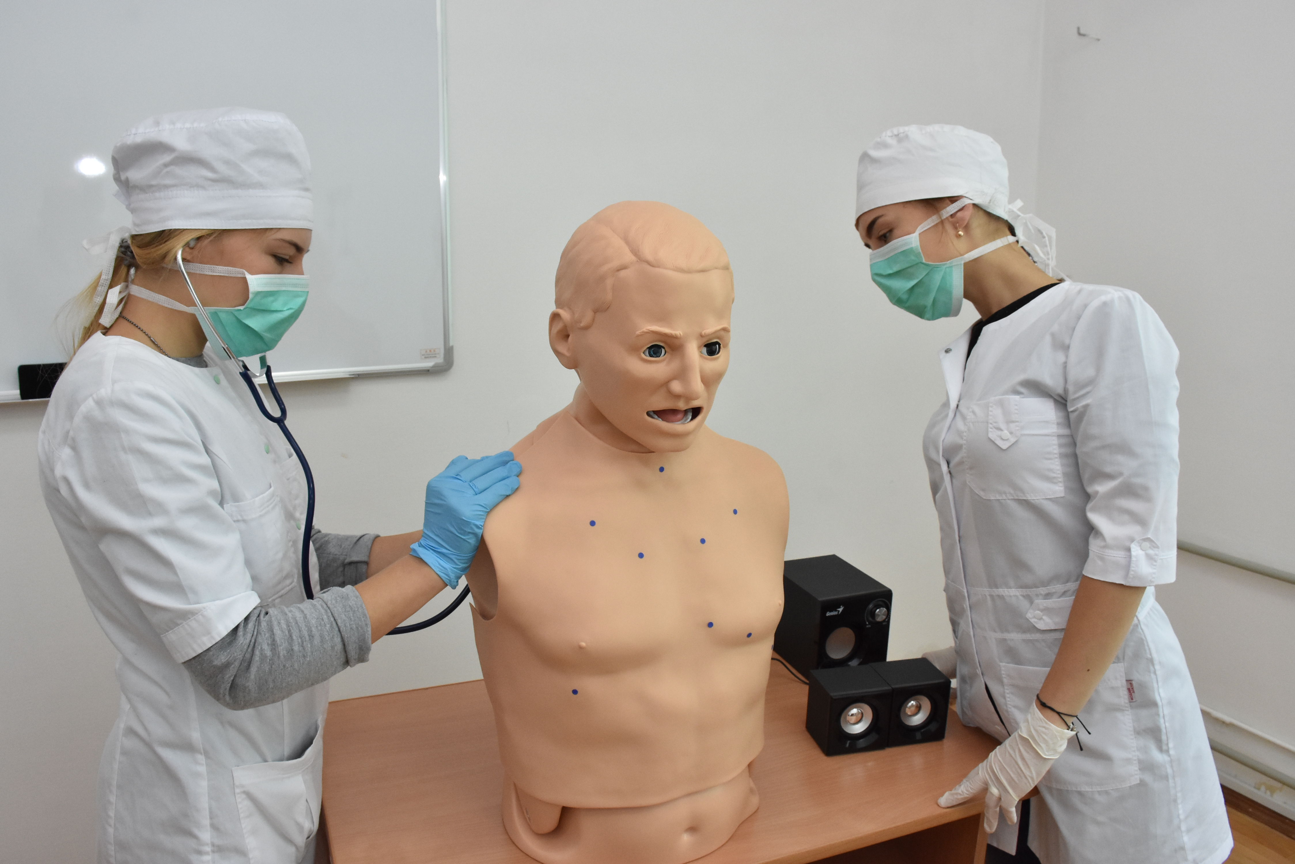 Студенти на заняттях у центрі симуляційного навчання Тернопільського державного медичного університету імені І. Я. Горбачевського.